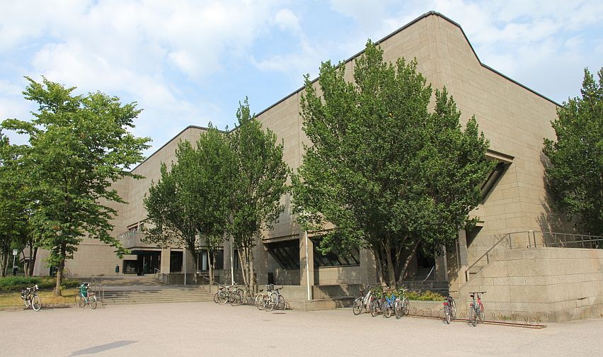 Vantaan kaupungin pääkirjasto Tikkurilassa (kesä 2013).